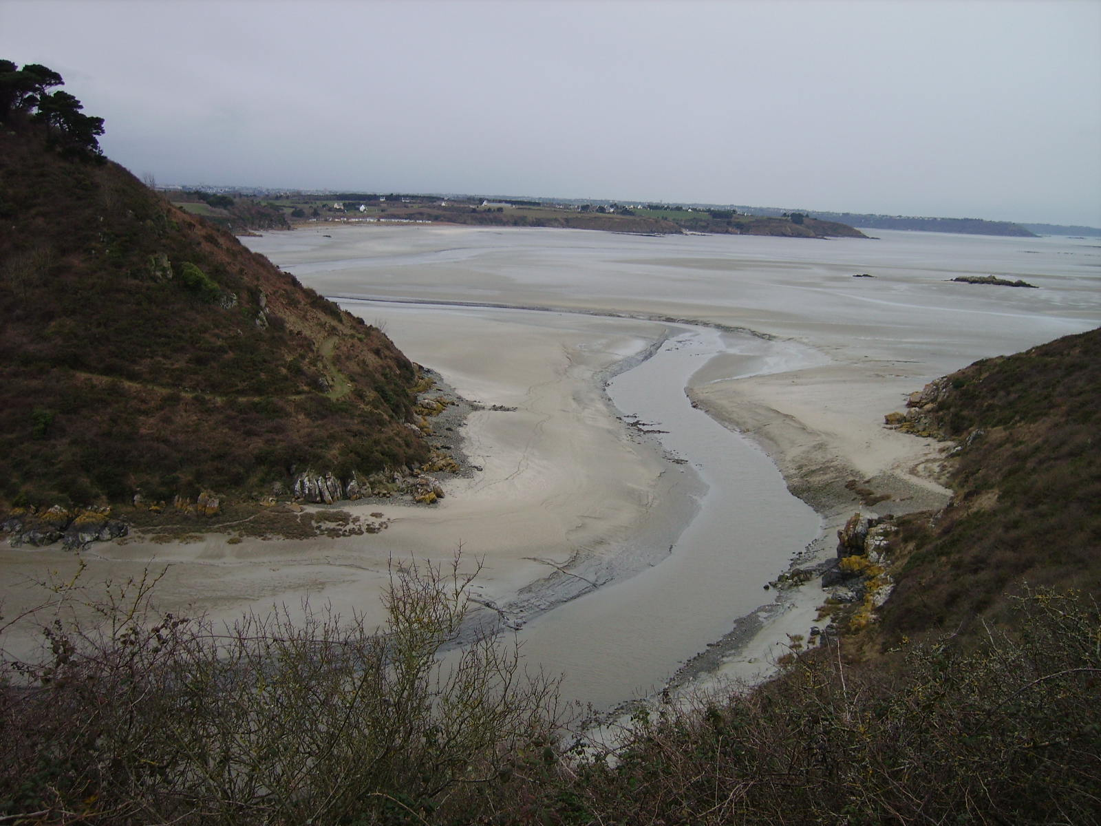 Promenado laŭlonge de la dekstra bordo de la enfluejo de la rivero Gouessant